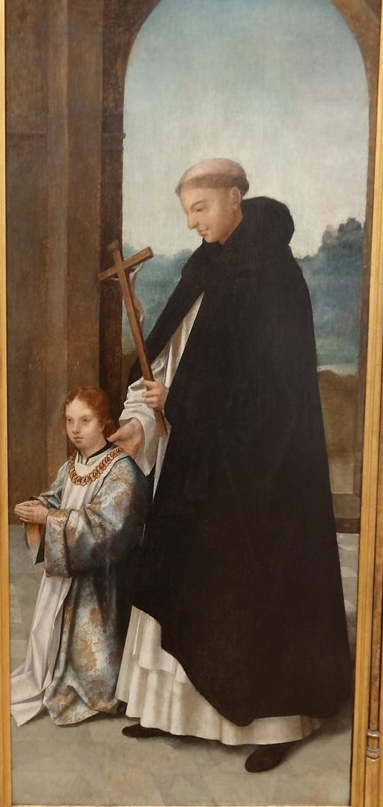 O Príncipe D. Luís e um santo Dominicano é o painel direito do Tríptico dos Infantes tendo de altura 157 cm e de largura 67,5 cm. Fez parte de um grande retábulo que o rei D. Manuel mandou fazer para a capela mor da igreja do mosteiro dominicano em Almeirim. Está no MNAA.